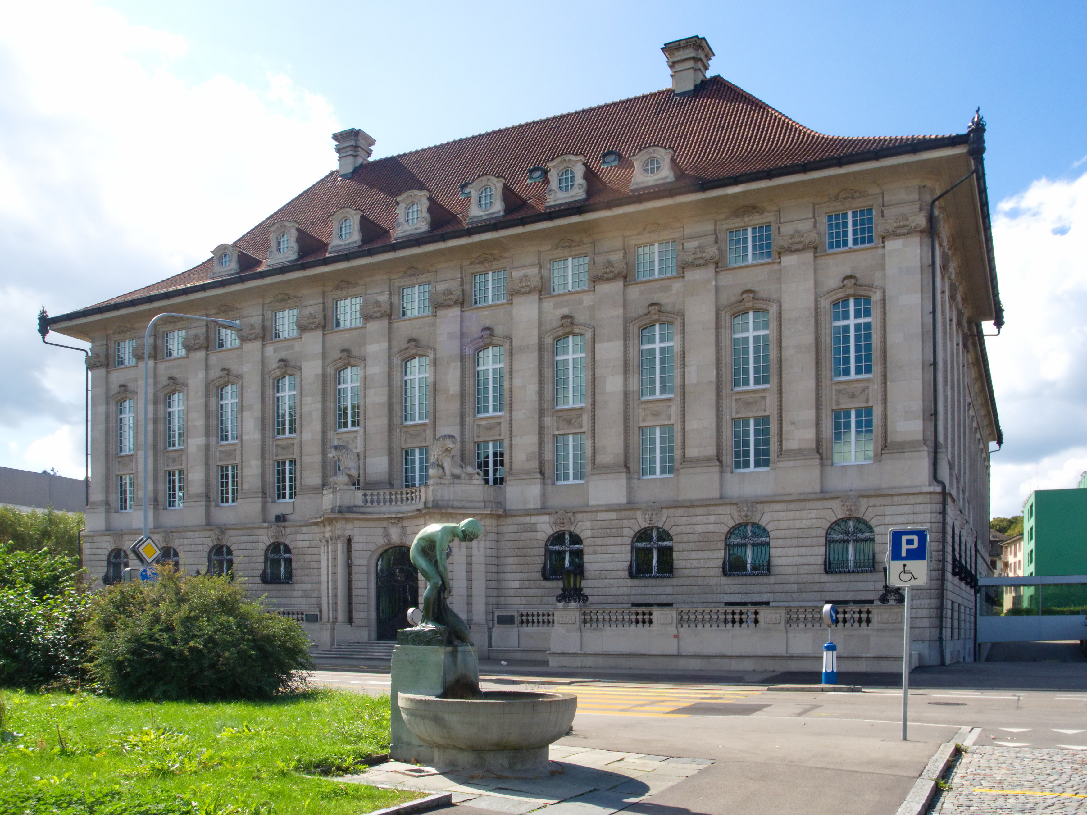 Firmenarchiv der Swiss Re